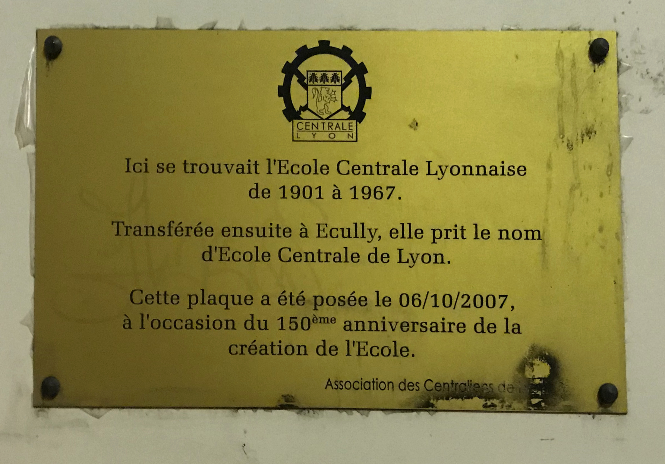 Plaque rappelant l'emplacement de l'école centrale lyonnaise (future école centrale de Lyon), rue Chevreul, à Lyon.